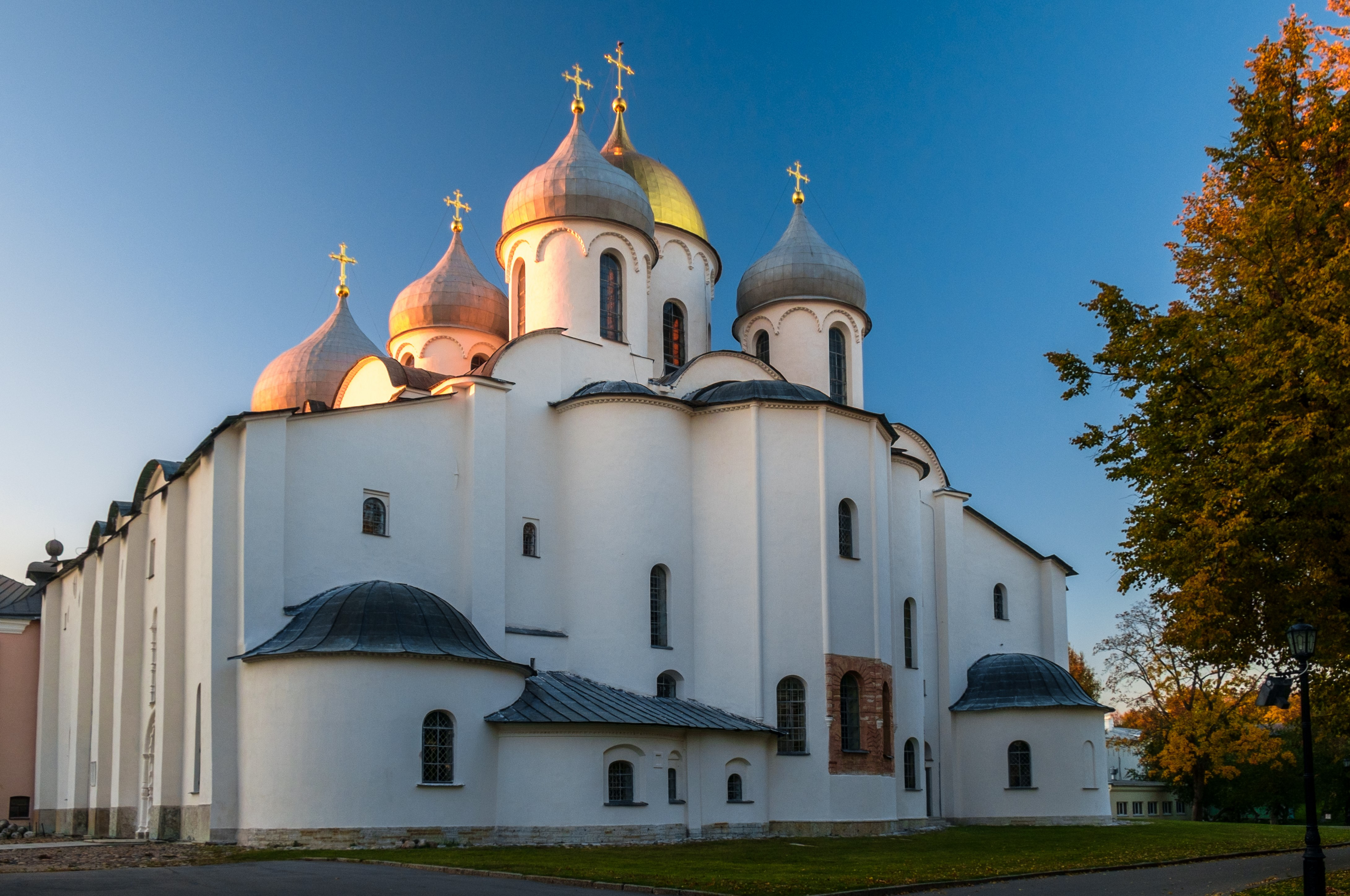 Собор Софийский: Великий Новгород, Новгородская область